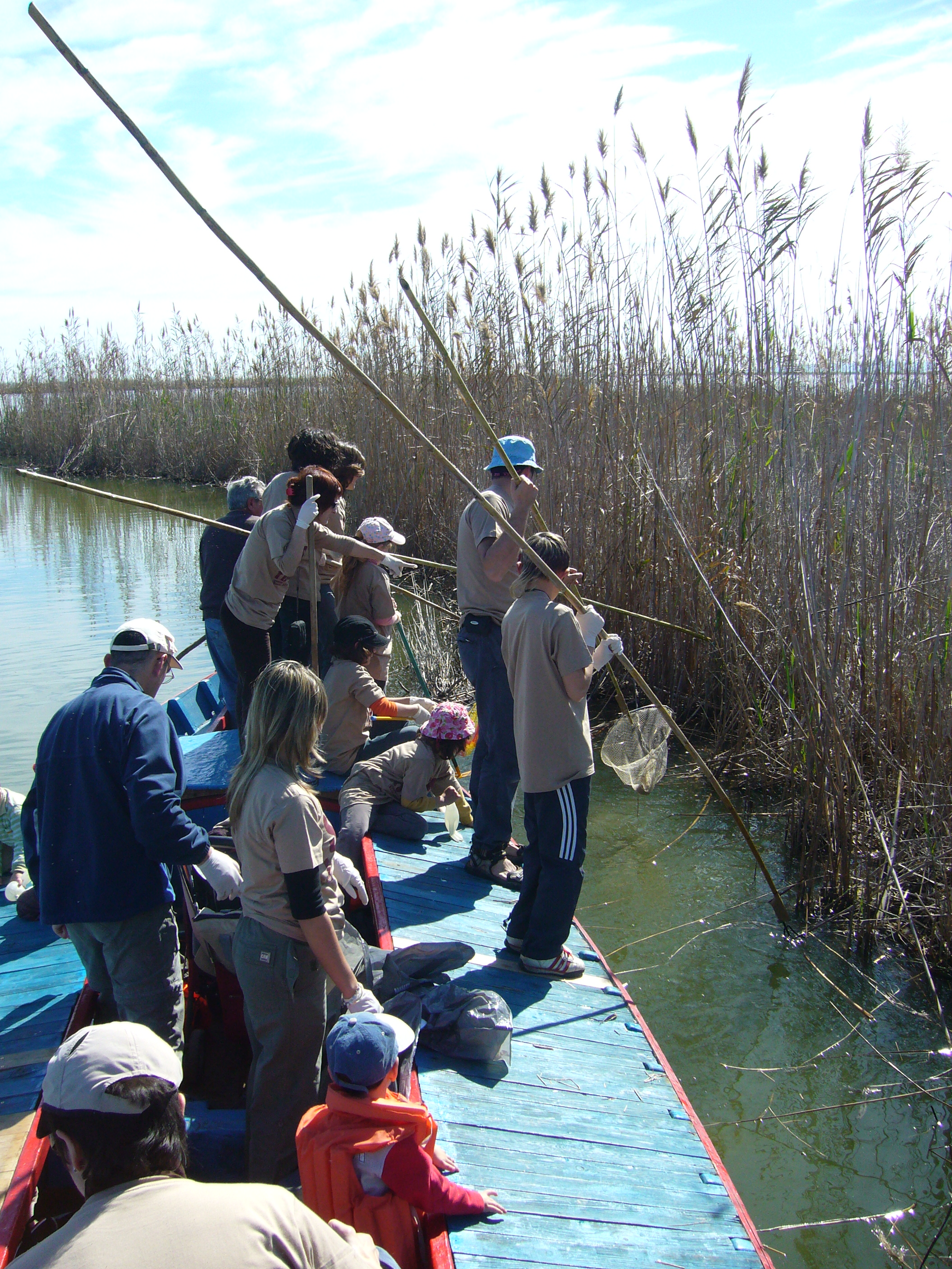 Voluntariat a l'Albufera, netejant les motes al 2008